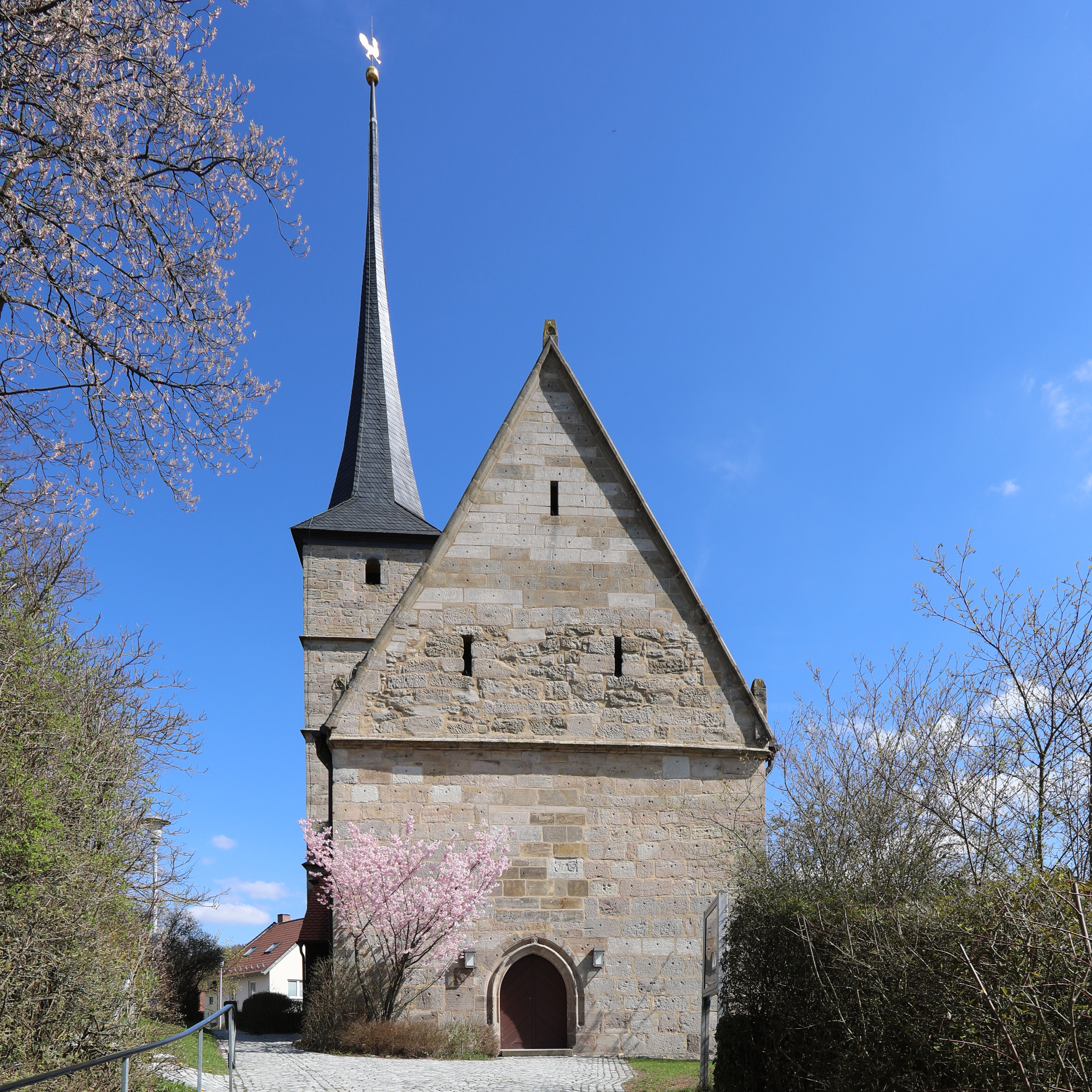 Evangelische Pfarrkirche Unserer Lieben Frau in Seidmannsdorf